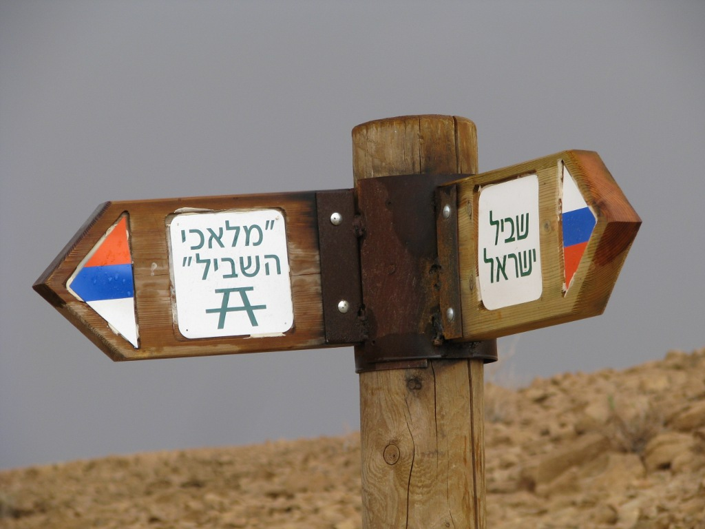 שלט הפניה למלאכי שביל של מושב שחרות